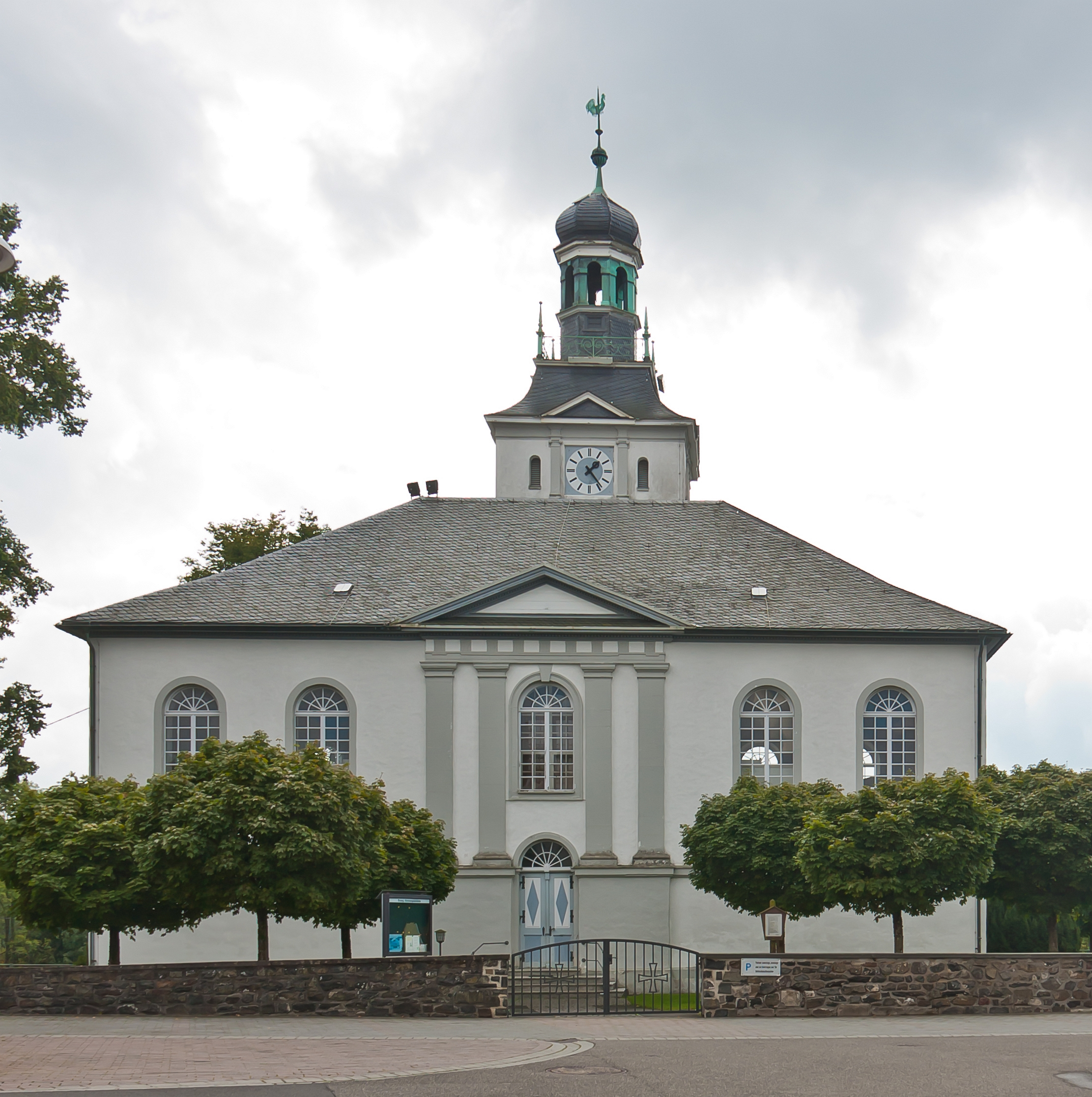 Evangelische Pfarrkirche Bad Marienberg This is a photograph of an architectural monument.It is on the list of cultural monuments of Bad Marienberg (Westerwald)